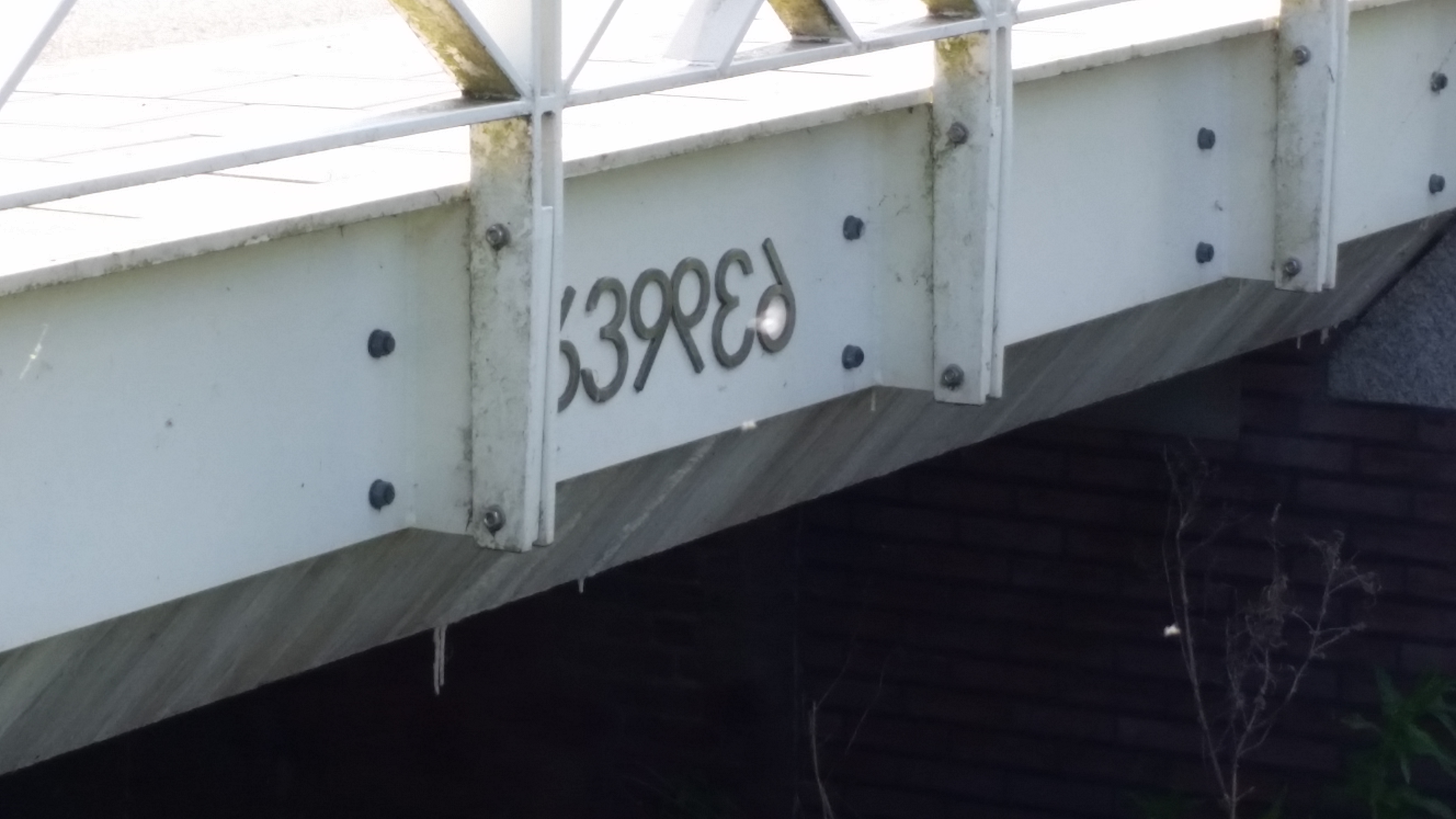 Brug 639, Veenderijbrug, Osdorperweg, Amsterdam met afwijkende nummeraanduiding